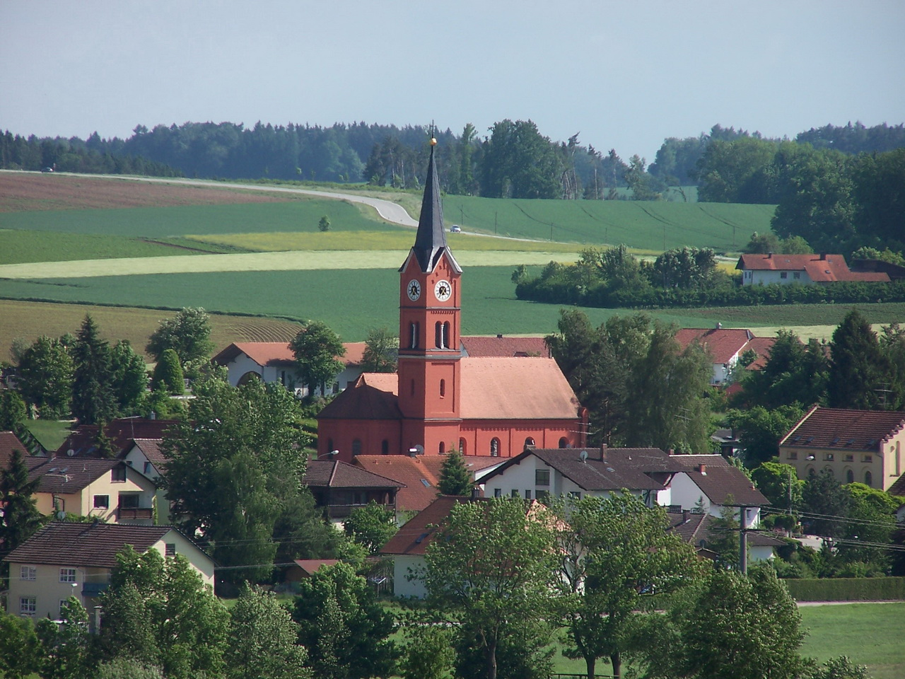 Kirche St. Georg Weichshofen, Gemeinde Mengkofen. Die Kirche wurde 1886 unter dem Pfarrer Karl Bachner im neuromanischen Stil erbaut.